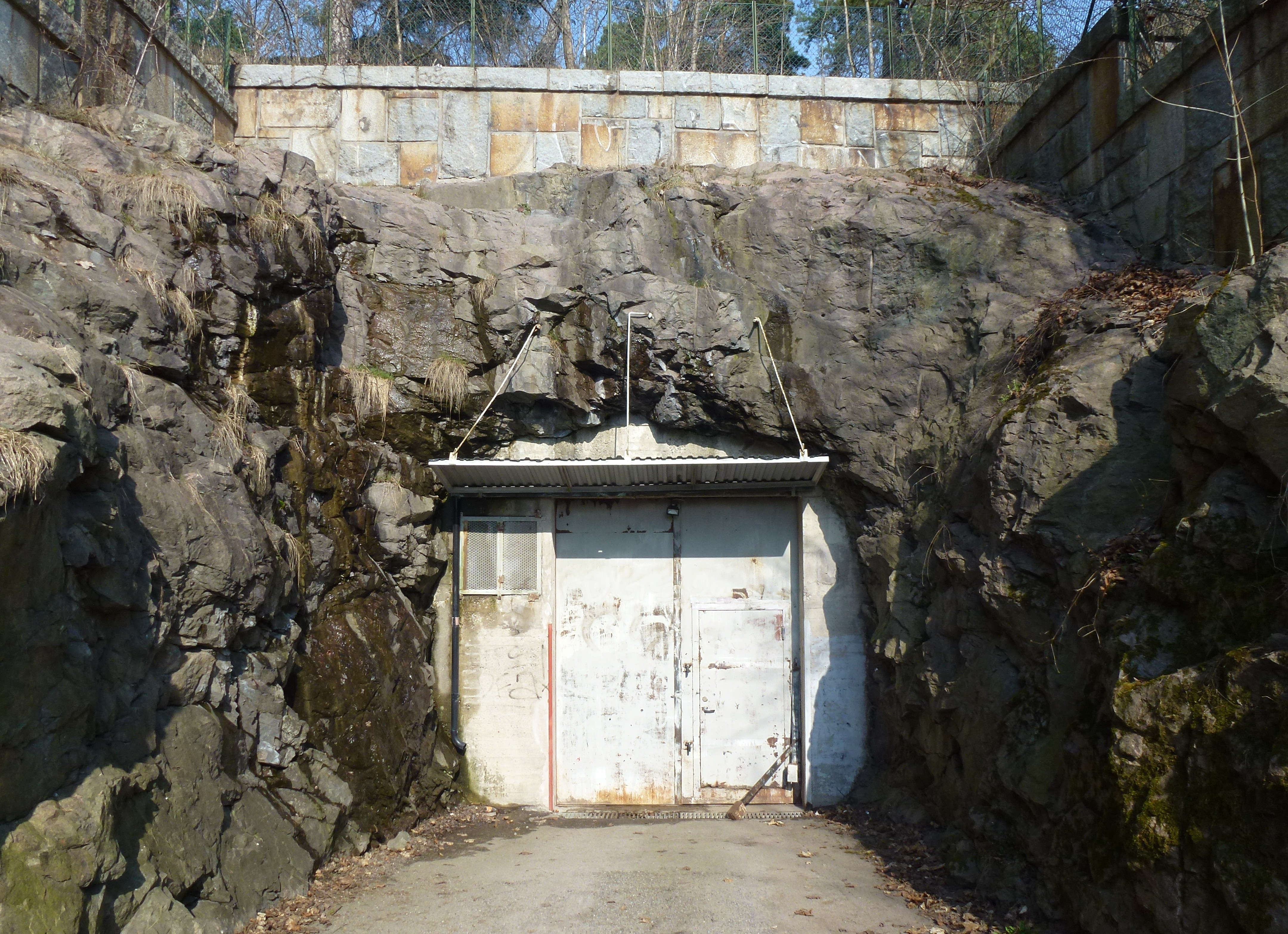 FE (framskjuten enhet) "Liljan" i Bromma, huvudingång